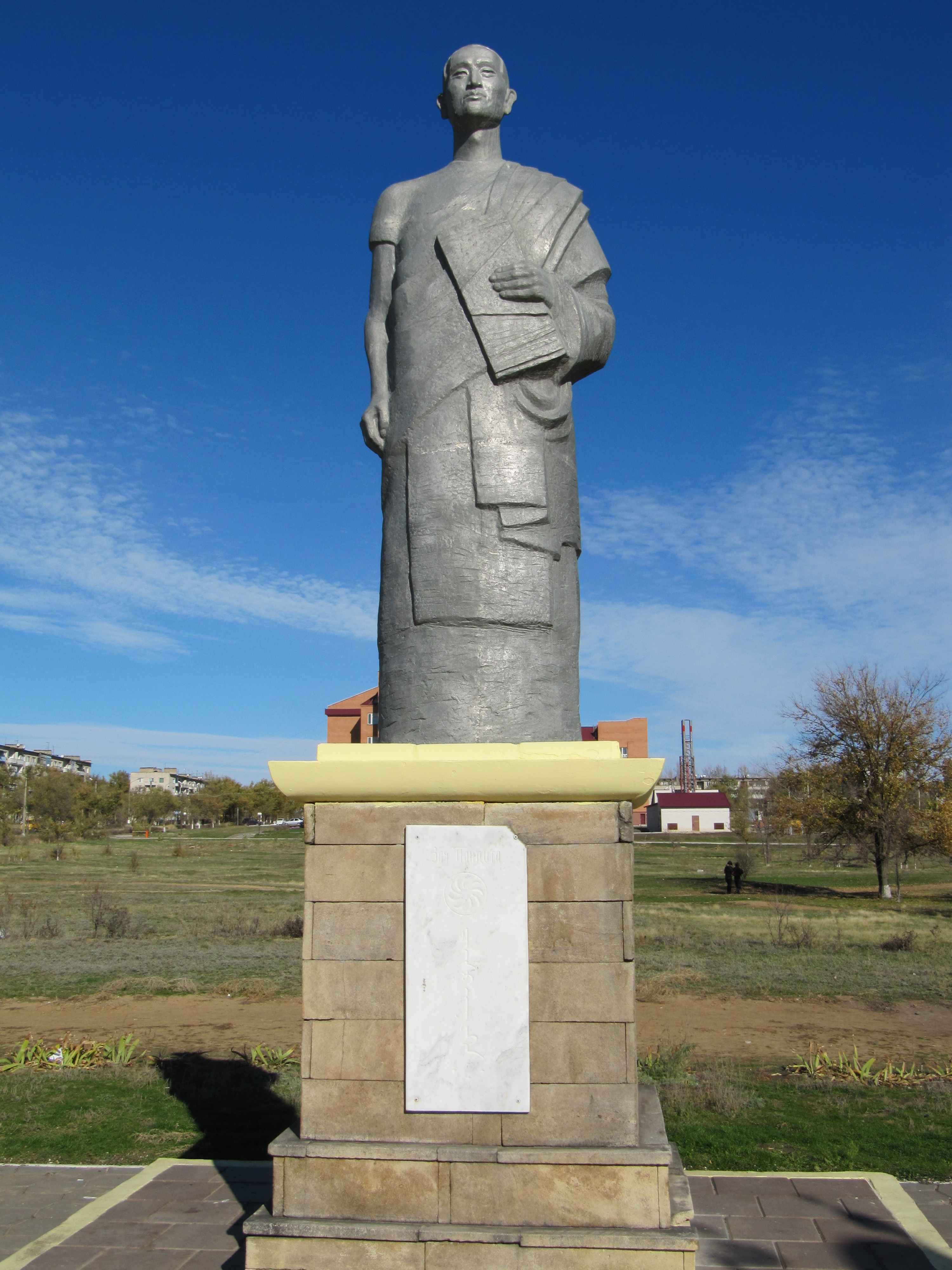 Памятник Зая-Пандите, Элиста, Калмыкия